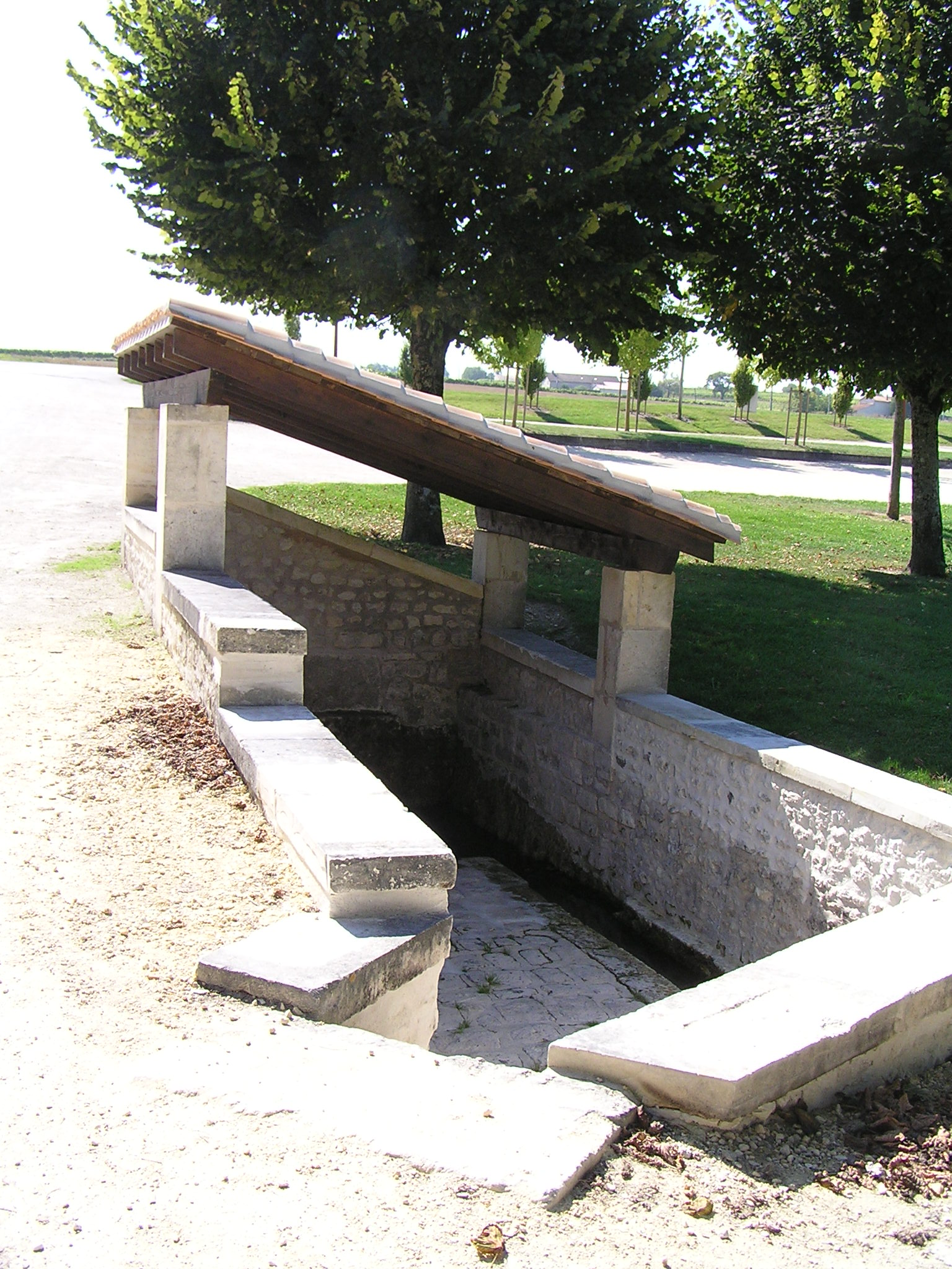 lavoir couvert au château de Lignières-Sonneville